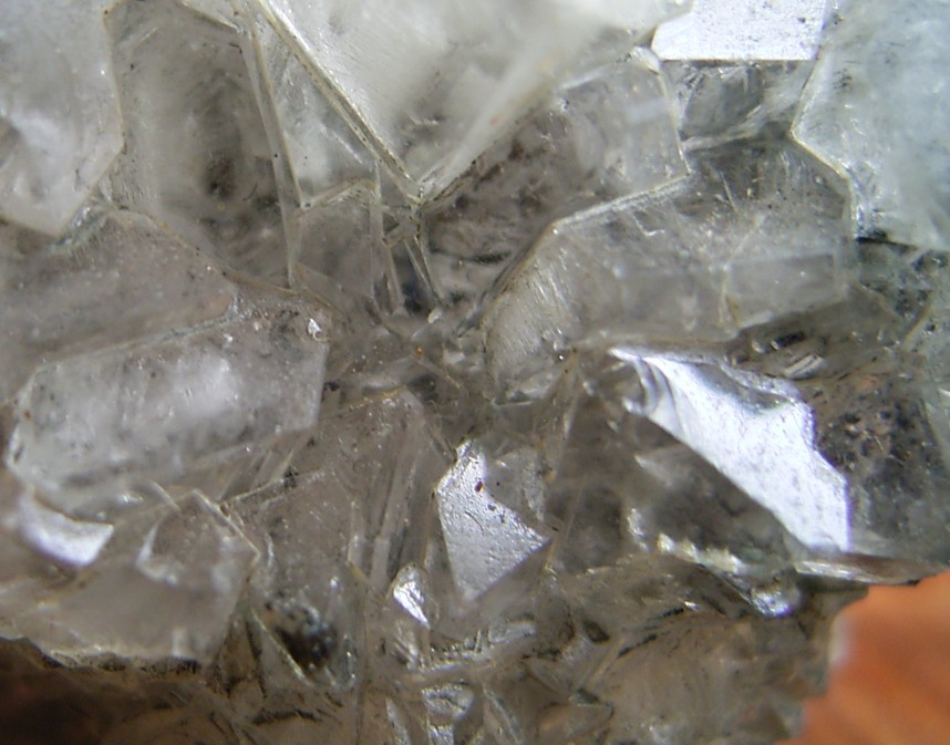 Alunit_Vallés Oriental,Barcelona,Spanien